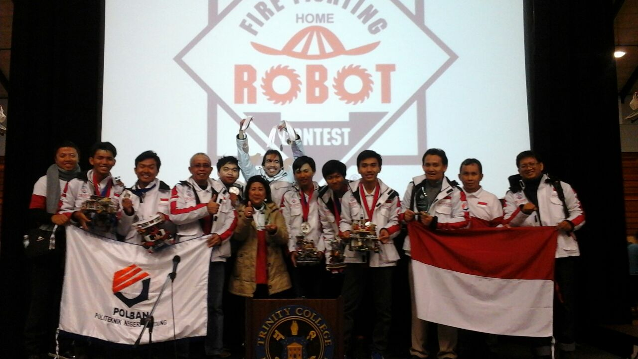 Robotika Polban Juara 1 di Trinity College